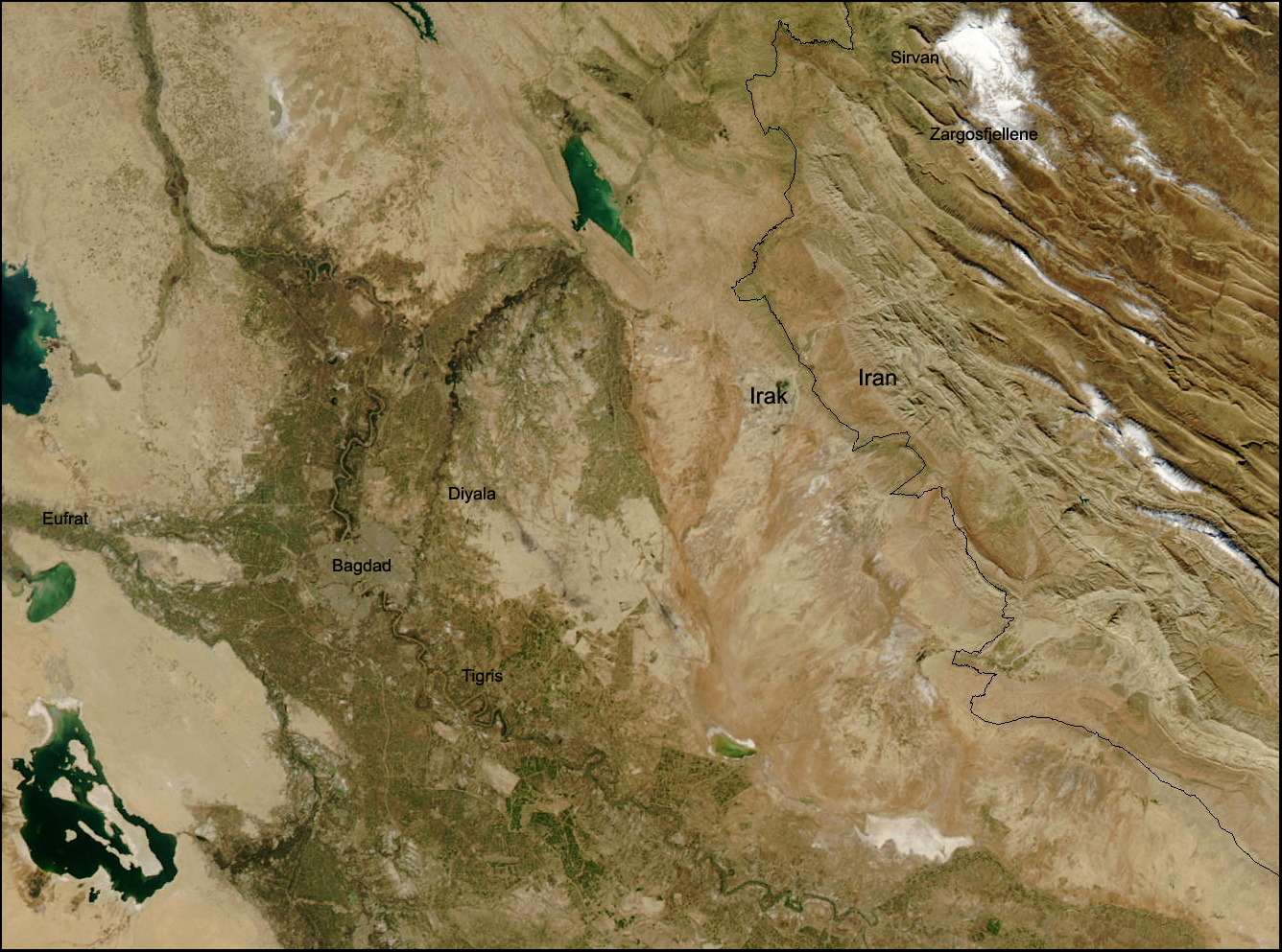 Sattelittfoto over Diyalaelvens løp fra Zagrosfjellene i Iran til utløpet i Tigris like sør for Bagdad i Irak